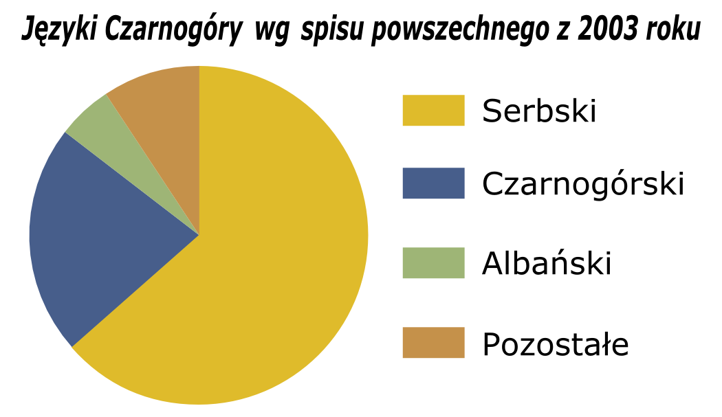 Wykres przedstawiający języki Czarnogóry wg. danych spisu powszechnego z 2003 roku.